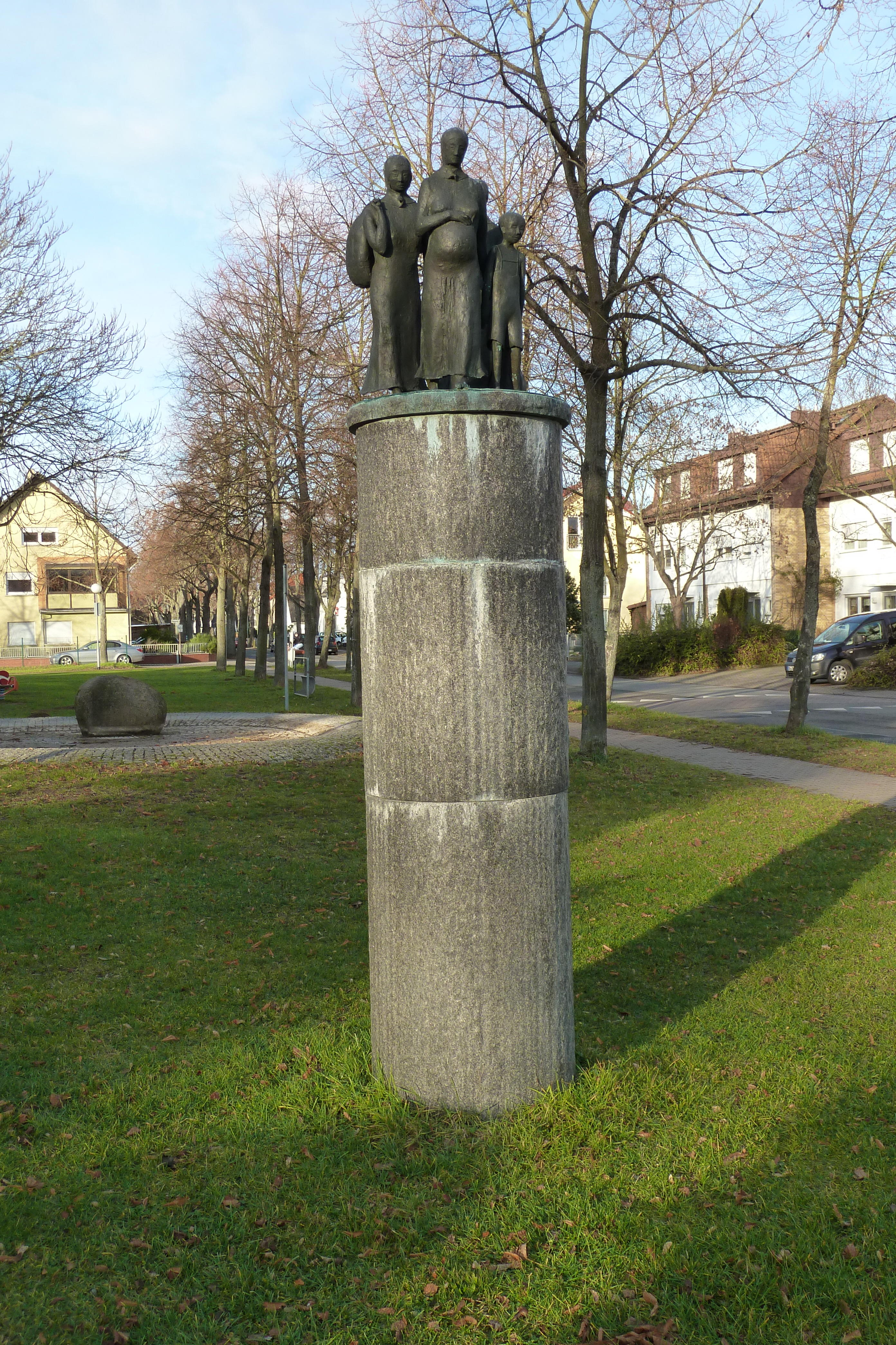 Vertriebenendenkmal am St. Stephans-Platz